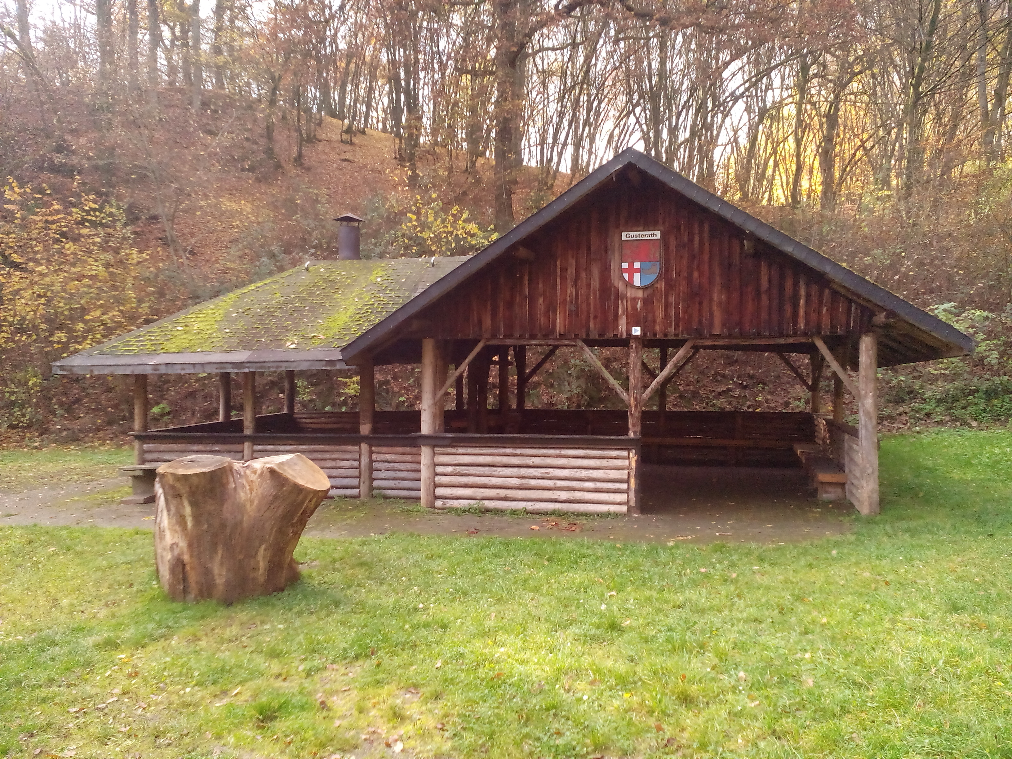 Die Gusterather Grillhütte im Herbst 2015, im Vordergrund steht der Baumstamm eines ehemaligen Naturdenkmals